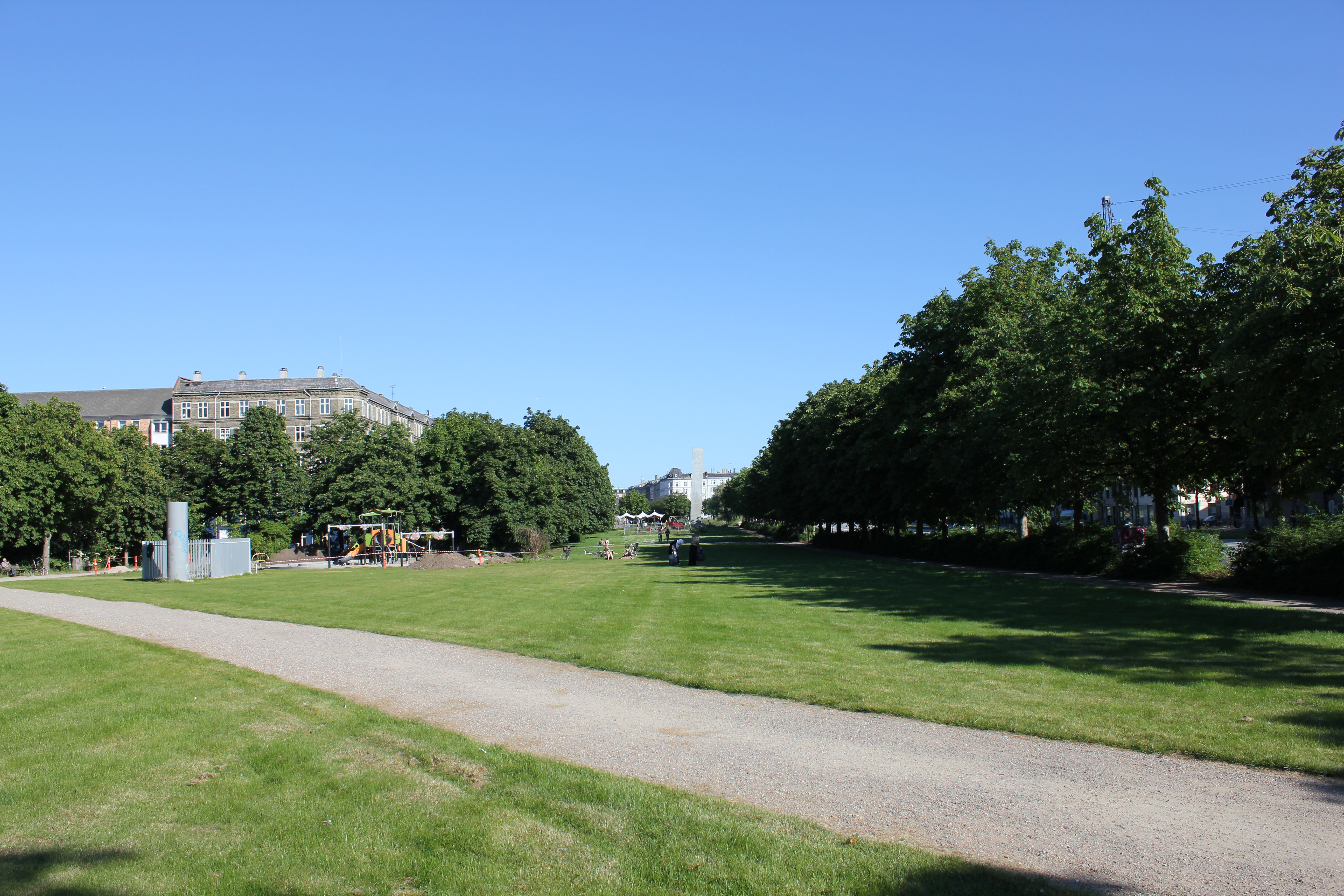 Fredens Park in Copenhagen